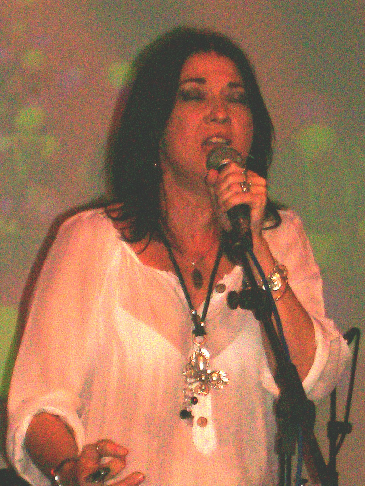 Anabel López